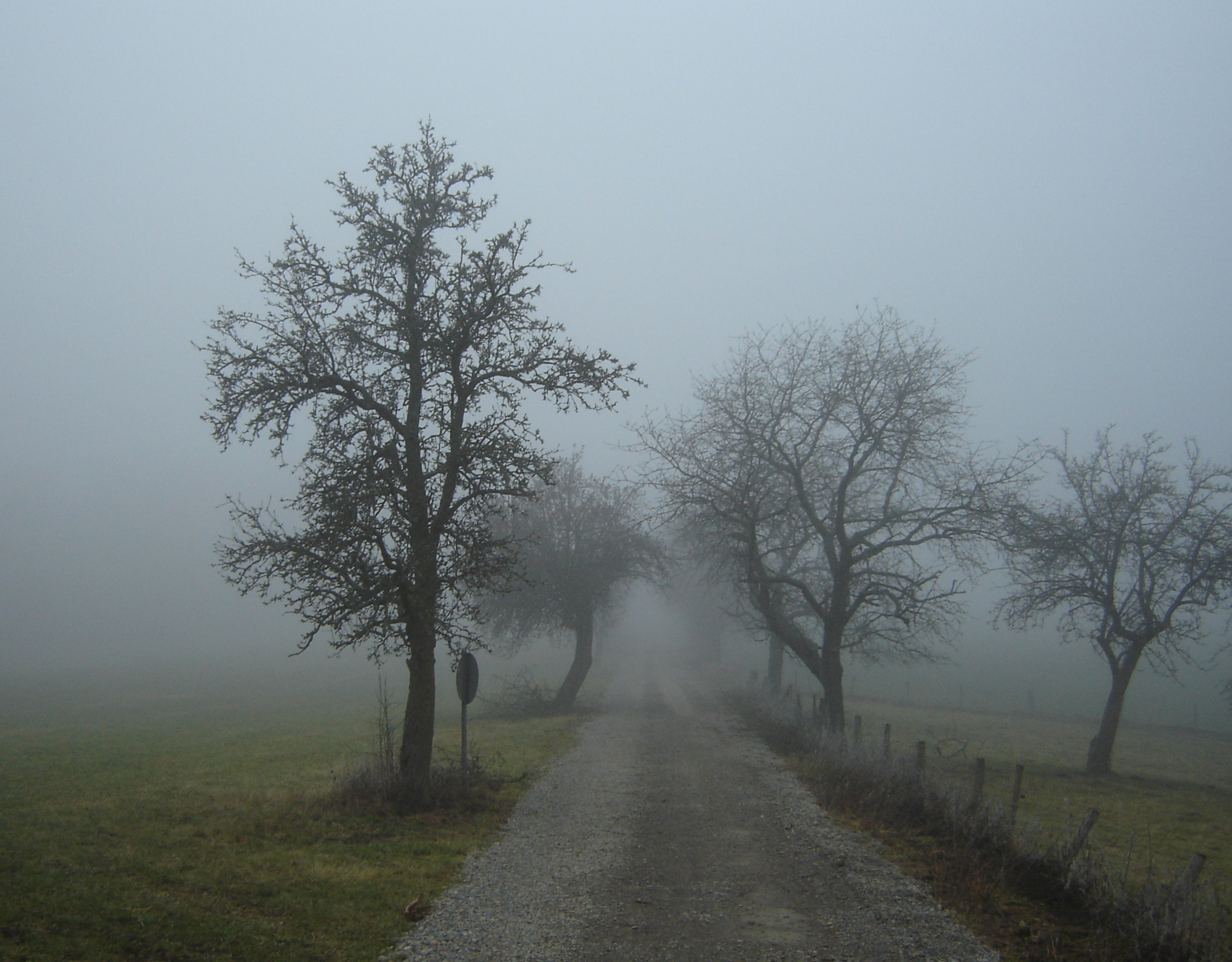 Nebel in der Region Rhön